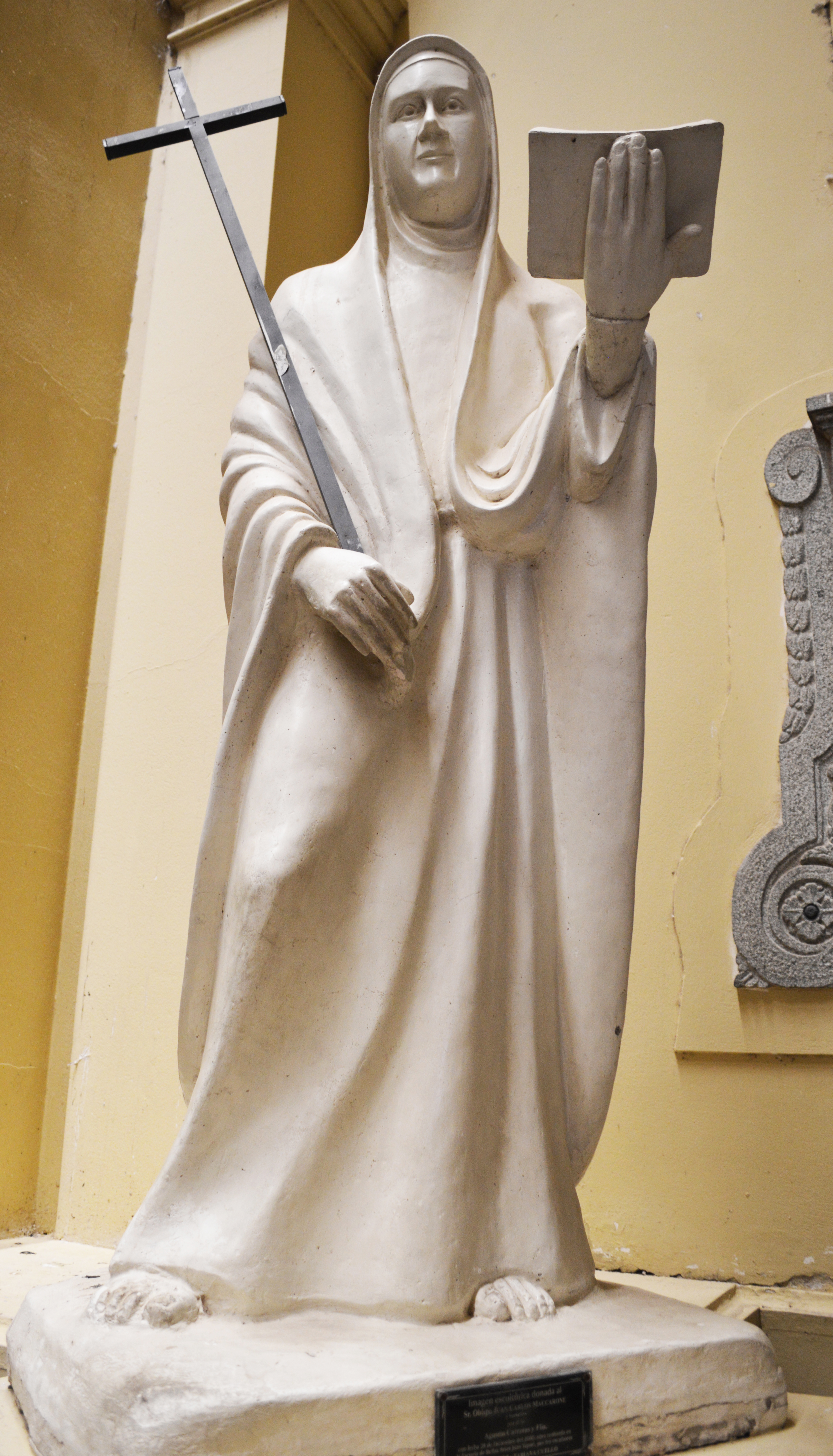 Estatua de María Antonia de Paz y Figueroa (1730-1799), beata argentina.